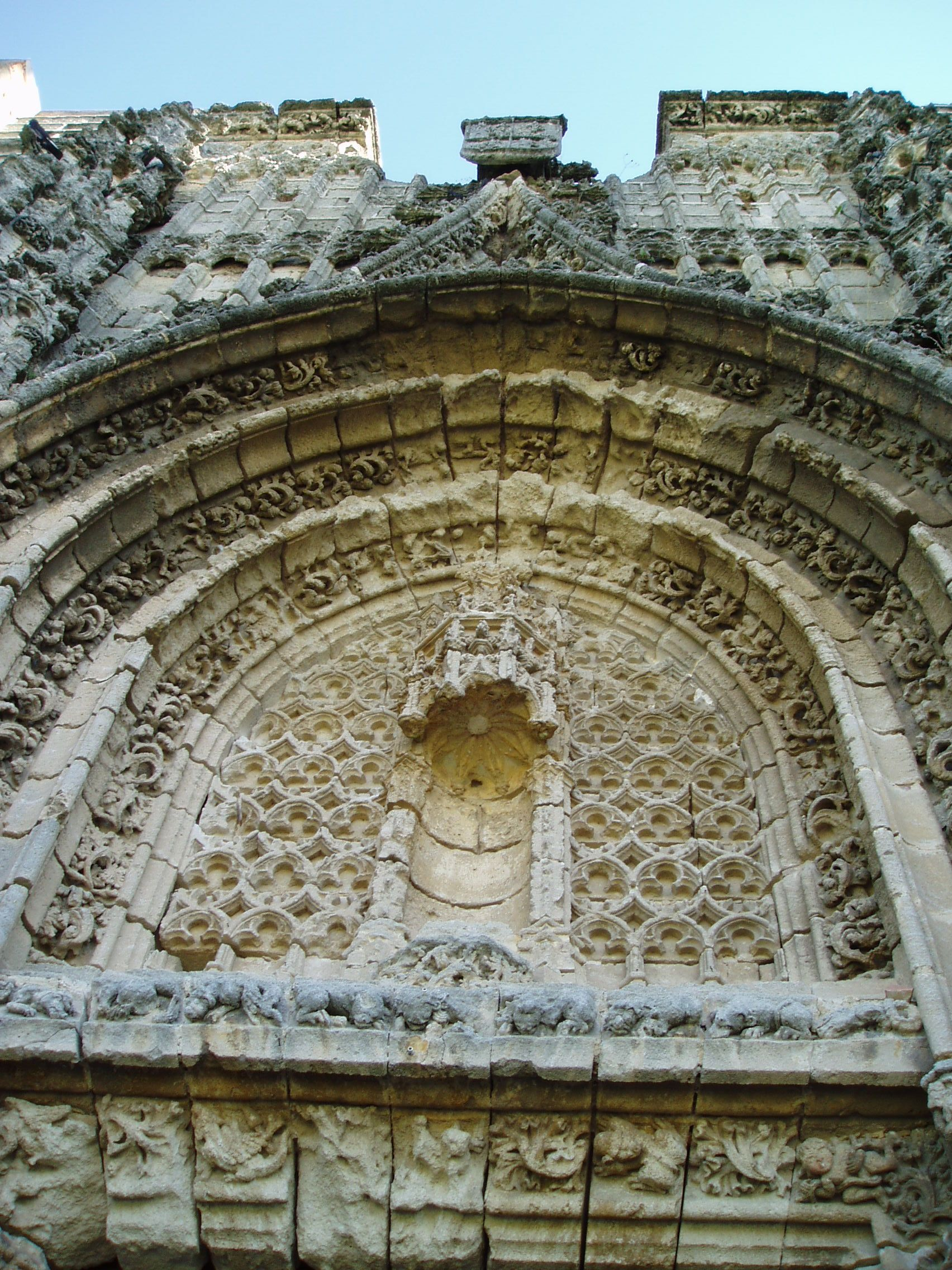 Portada del Monasterio de la Victoria, antiguo penal, en El Puerto de Santa María, Andalucía, España.